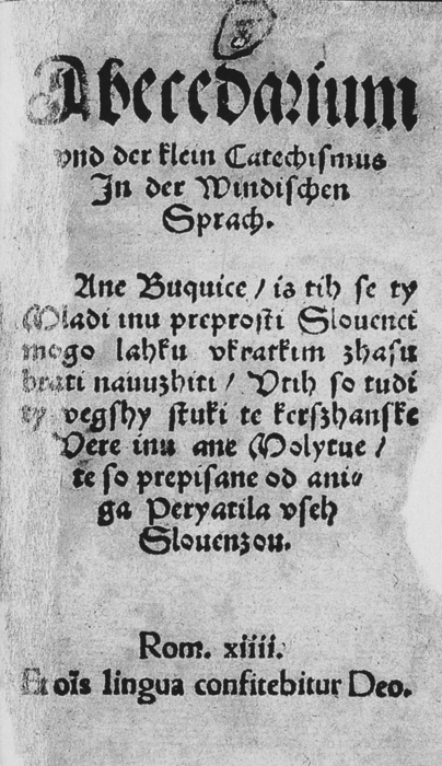 Abecedarium, prvi abecednik v slovenskem jeziku